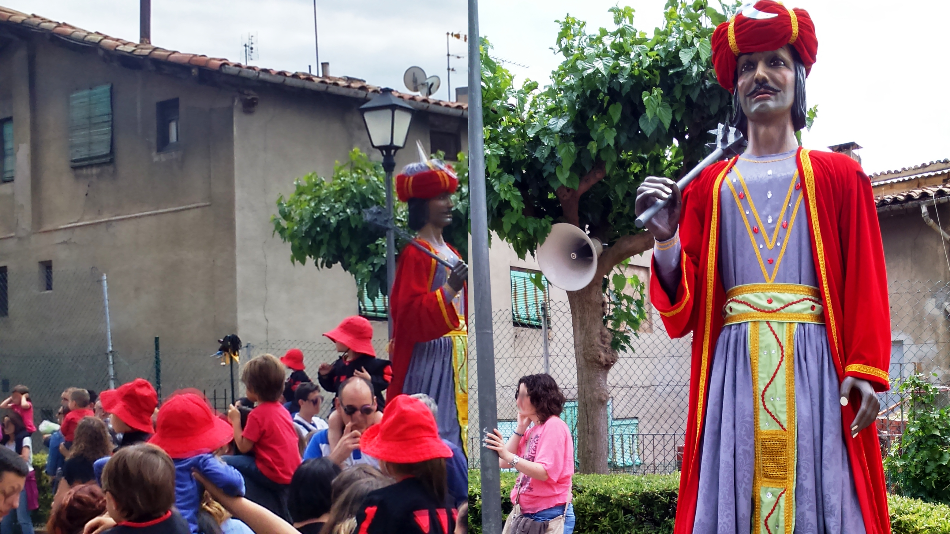 Patum del carrer de la Pietat de Berga. Any 2015